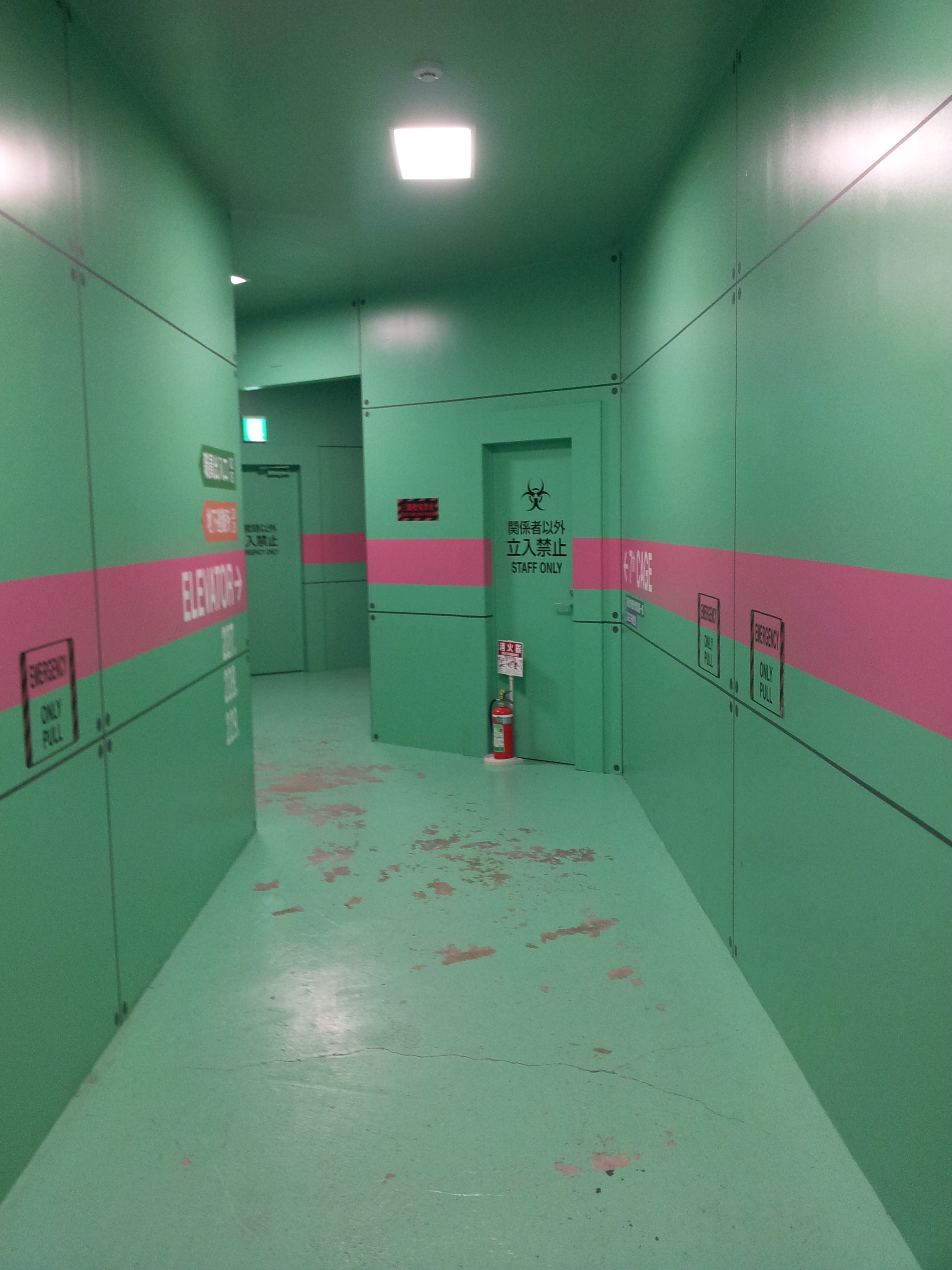 Riproduzione del quartier generale della Nerv (Evangelion) al Fuji Q Land